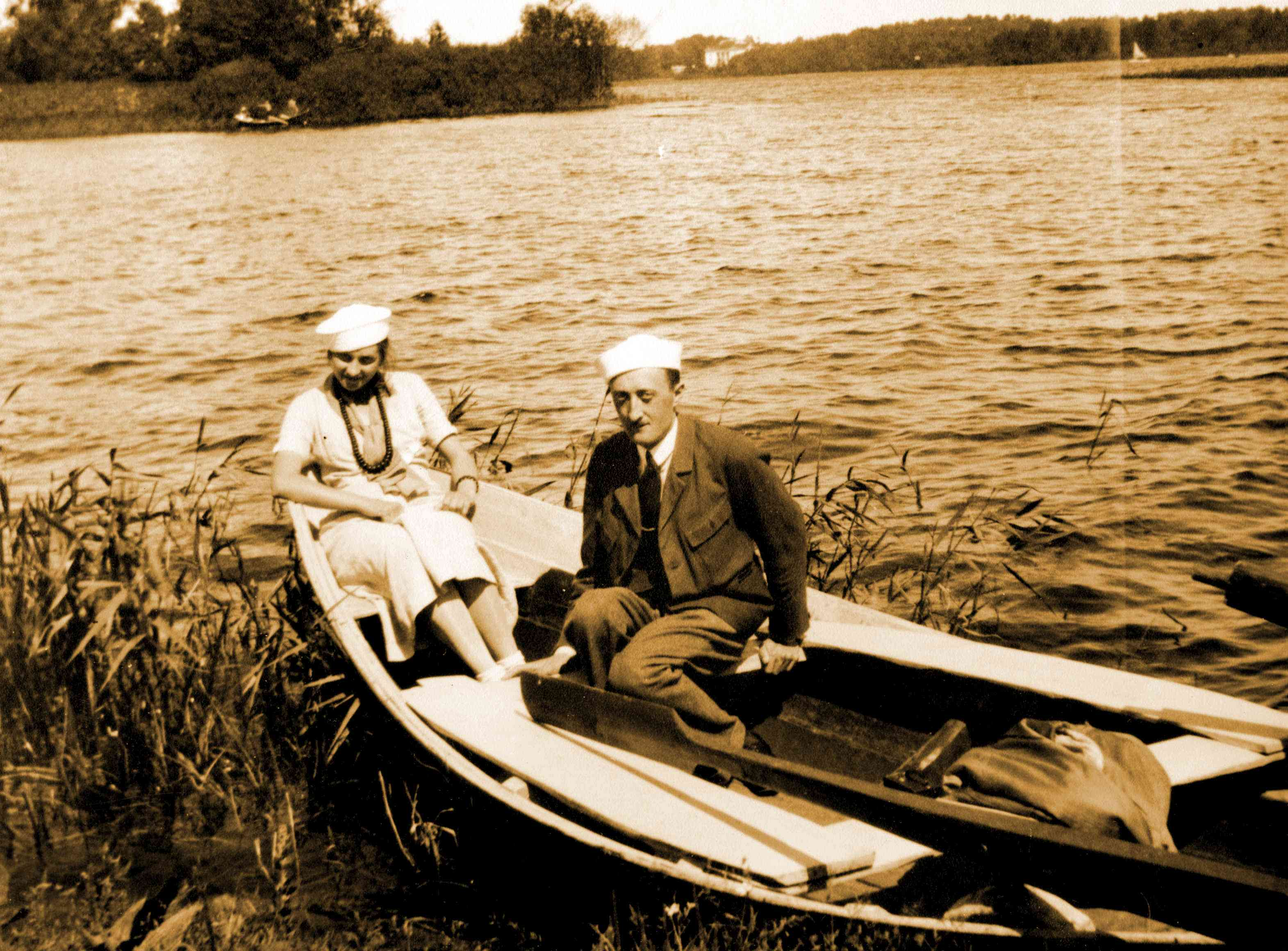 Maciej Masłowski w towarzystwie żony, Haliny, z wizytą u rodziny Girdwoyniów, w Trokach na Wileńszczyźnie, w latach 1930-ych - zdjęcie udostępnione przez Andrzeja Masłowskiego, pochodzące z rodzinnego archiwum. Autor nie jest znany i nie da sie go ustalić Można jedynie snuć domysły, że prawdopodobnie jest nim ktoś nieżyjący z rodziny pp.Girdwoyniów z Wileńszczyzny.